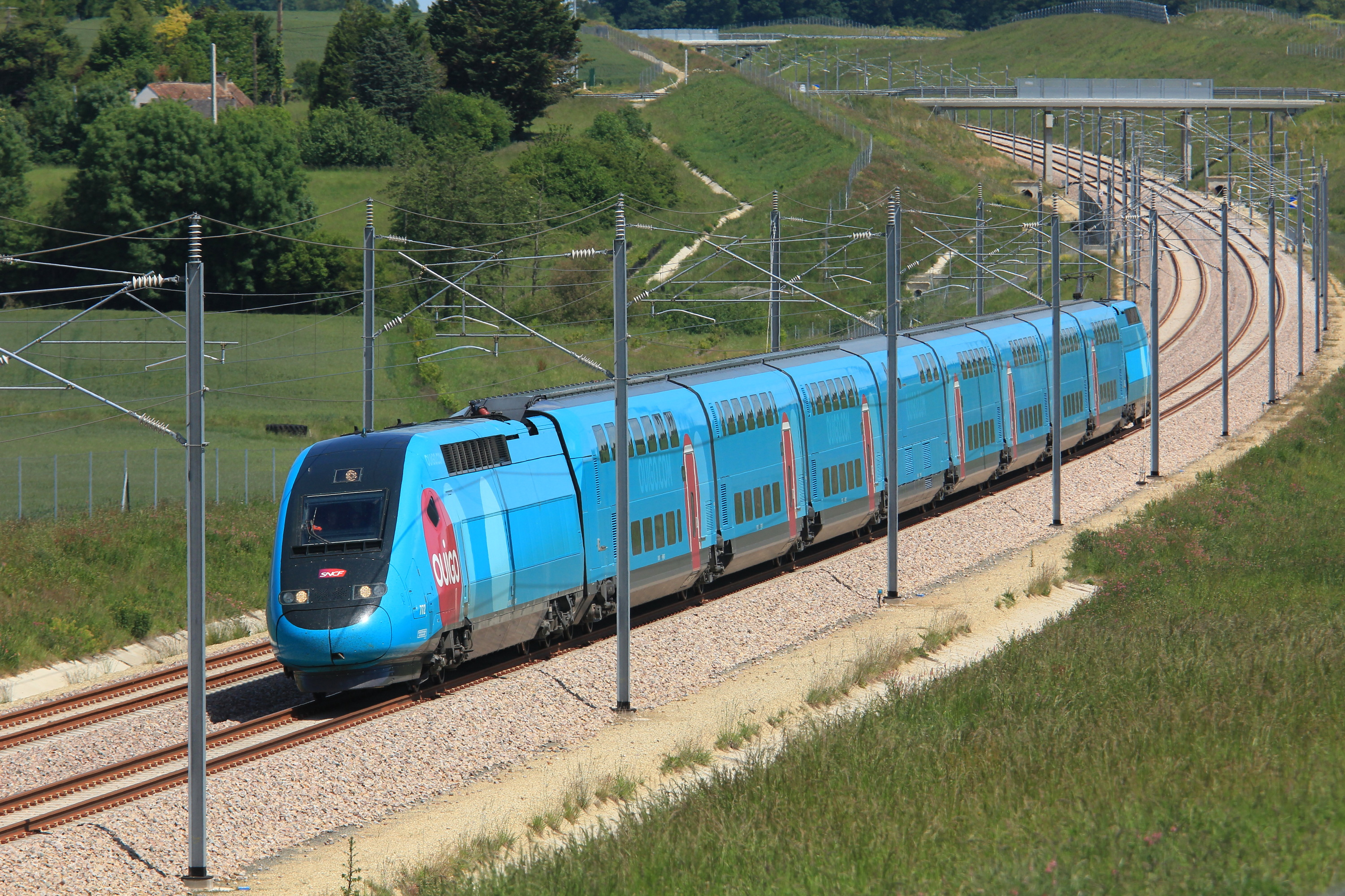 Passage sur la LGV BPL pas encore en service commercial, au niveau de la commune de Chantenay-Villedieu, de la rame TGV n° 772 Ouigo lors d'une marche à vide n° 805925 (Le Mans - Rennes) servant à la formation des conducteurs.